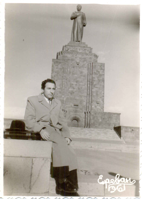 Գաբրիել Խաչատրյան